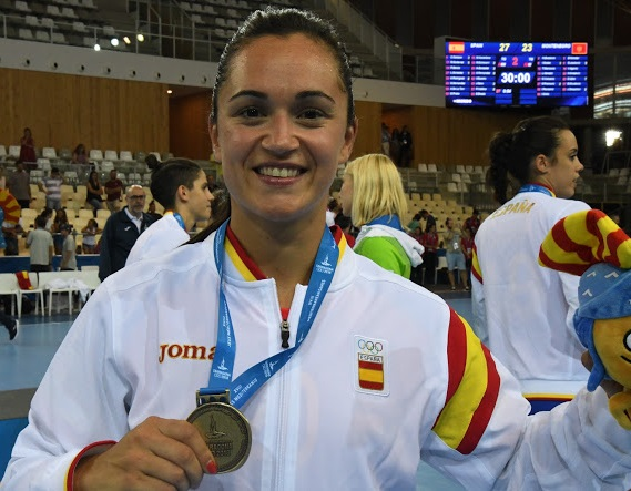 Medalla de ORO con España en los Juegos del Mediterráneo disputados en Tarragona. 30 Junio 2018.